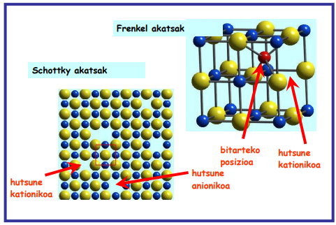 Frenkel eta Schottky akatsak